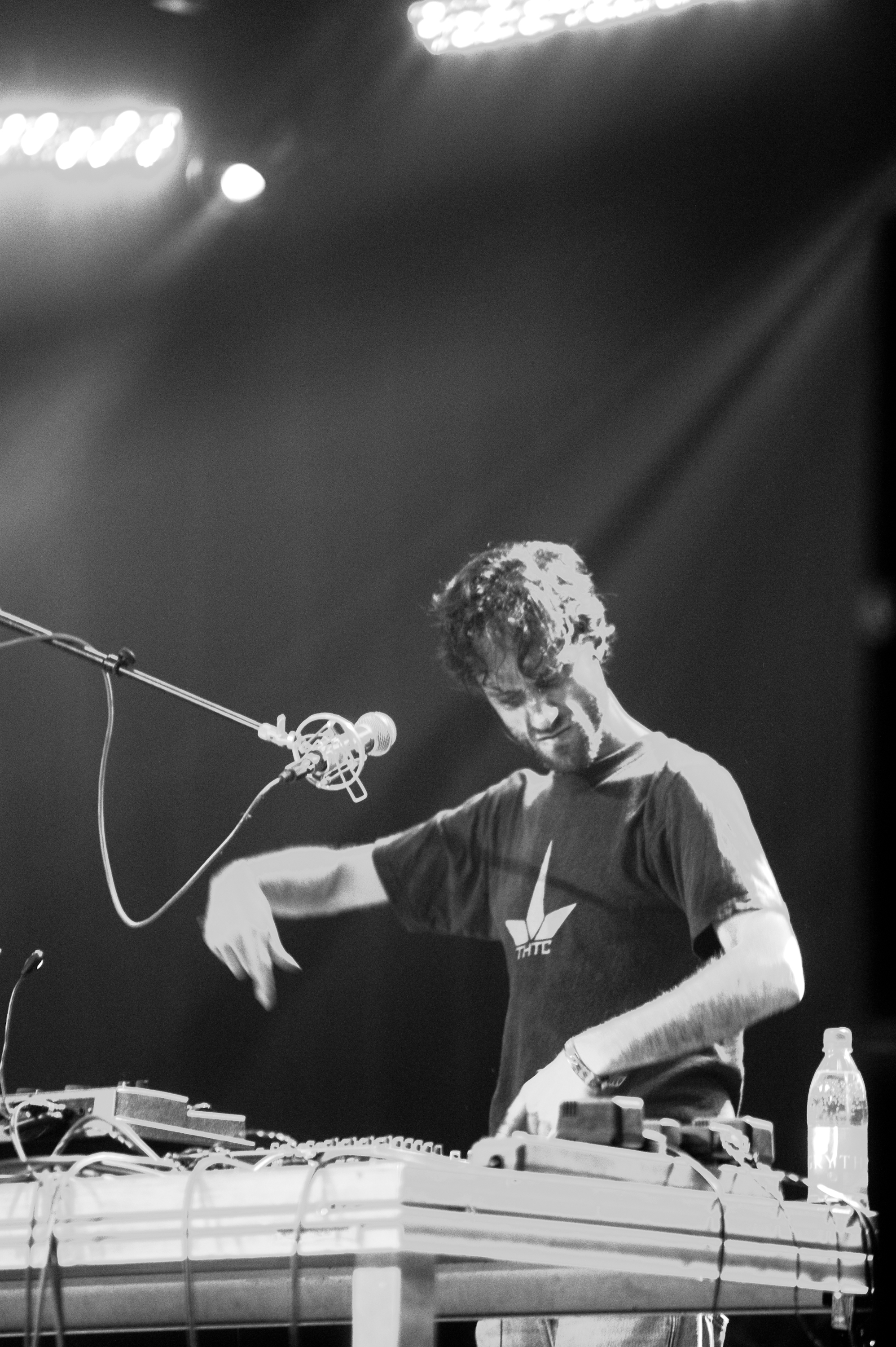 Beardyman